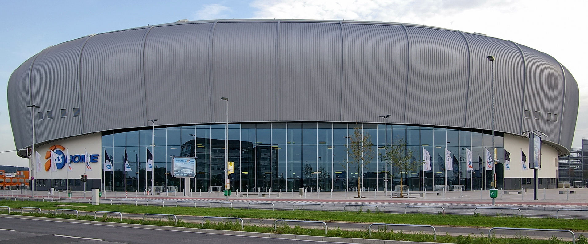 Eislauf-Stadion ISS-Dome der DEG Metro Stars in Düsseldorf